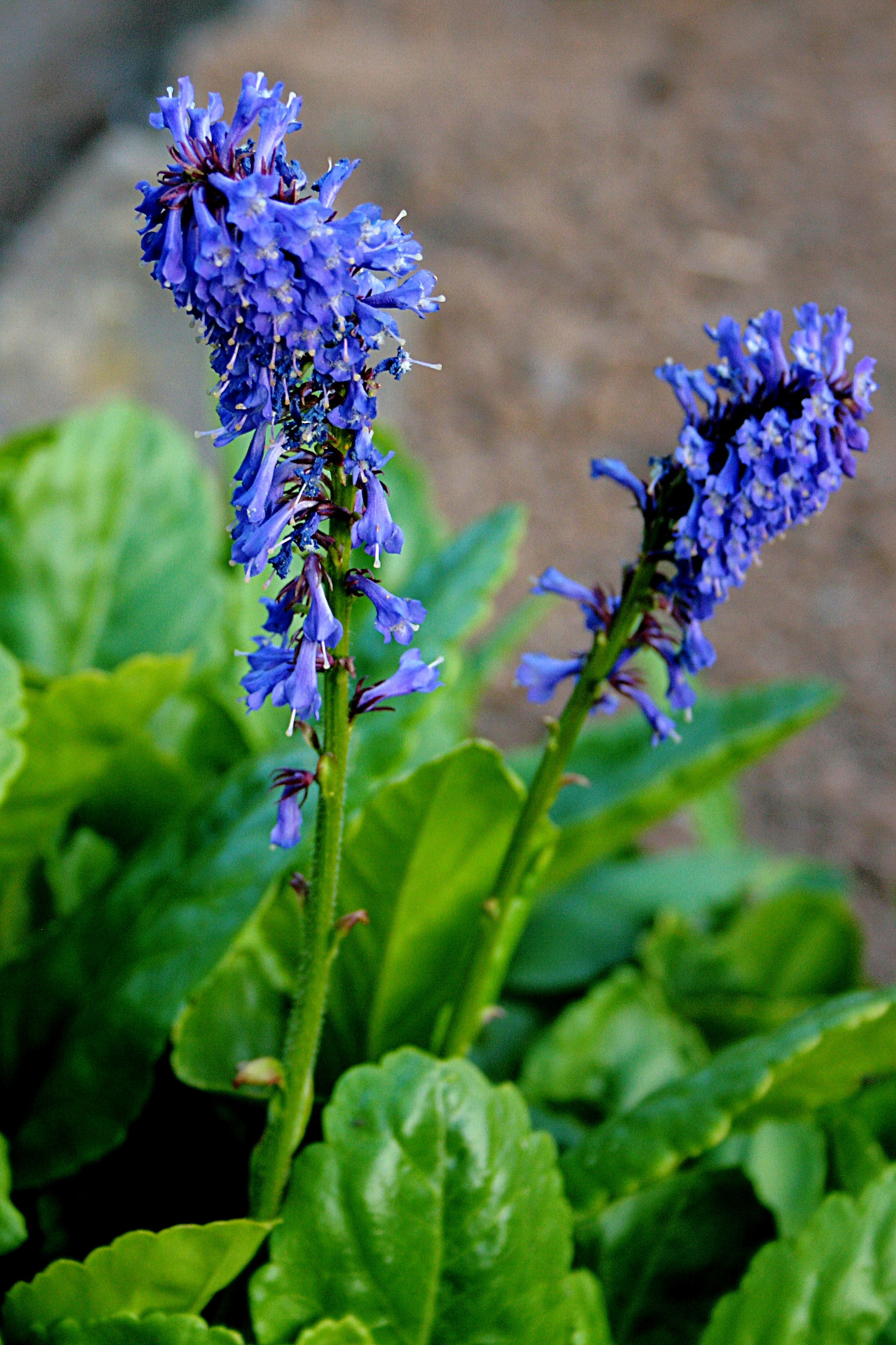 Ísland, Akureyri Botanical Gardens: Kärntner_Wulfenie: Wulfenia_carinthiaca